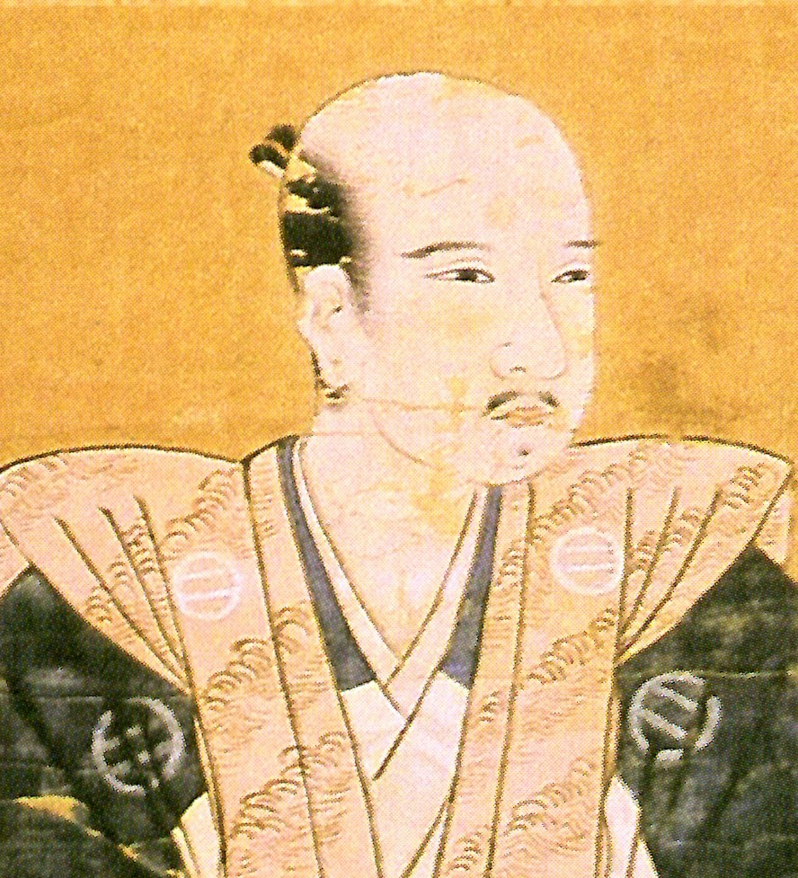 遠山秀友の肖像。